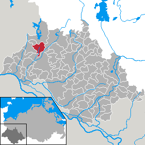 Kogel in Mecklenburg-Vorpommern - district Ludwigslust